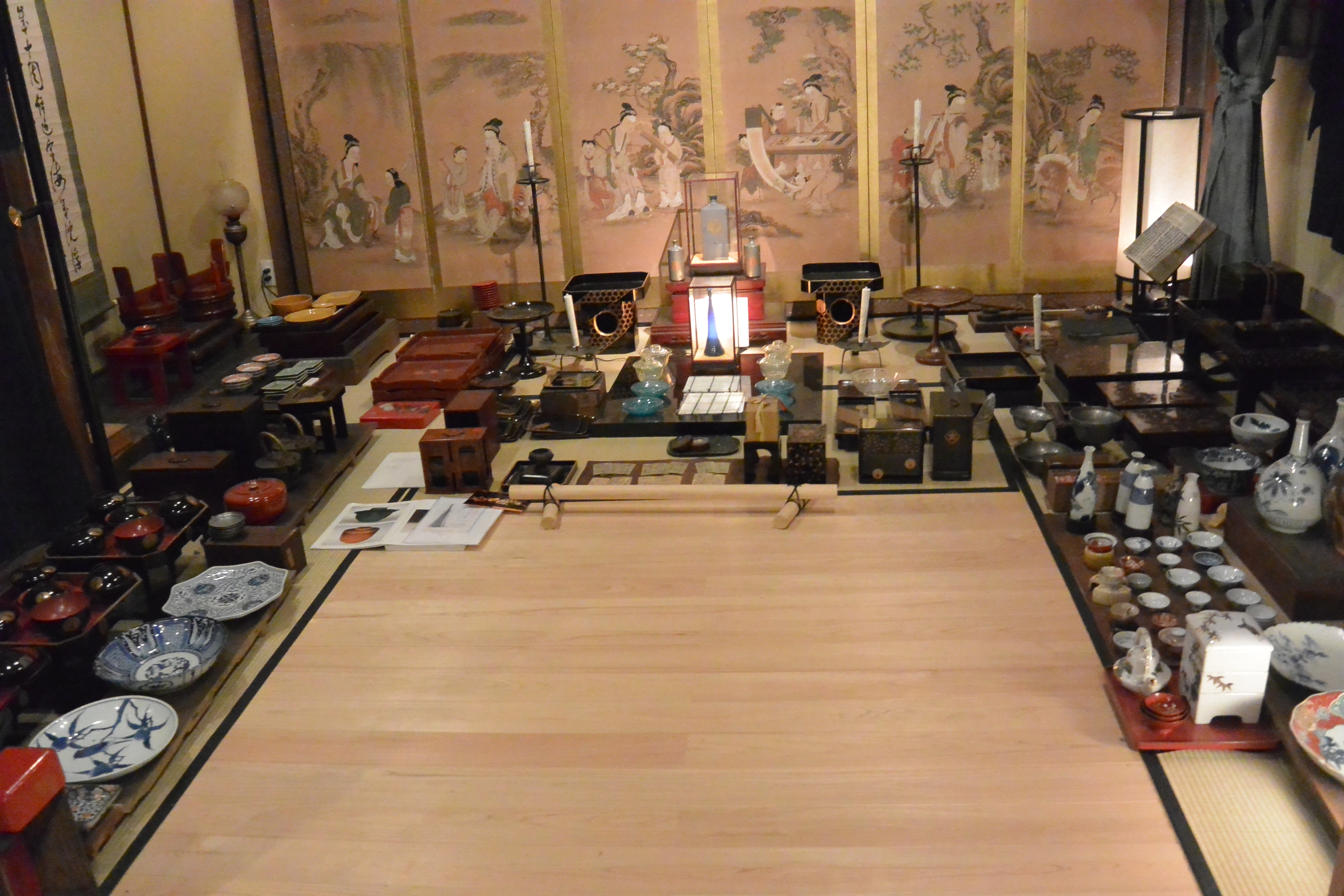 岡山県新見市の津国屋の土蔵の2階で公開されている什器 Nikon 1 AW1 + 1 Nikkor AW 11-27.5mm f/3.5-5.6